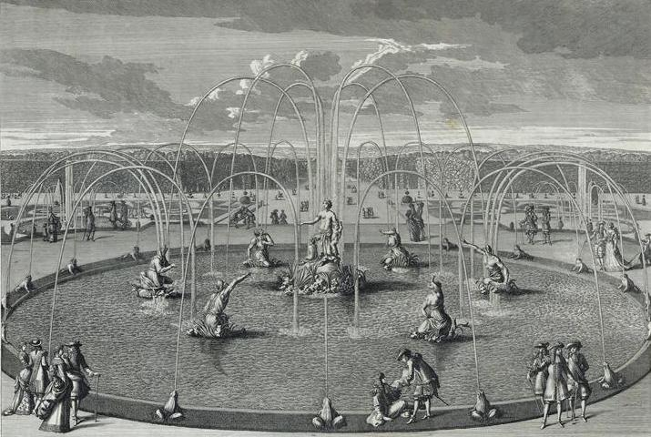 “Vue du Bassin de Latone dans les jardins de Versailles en 1678”